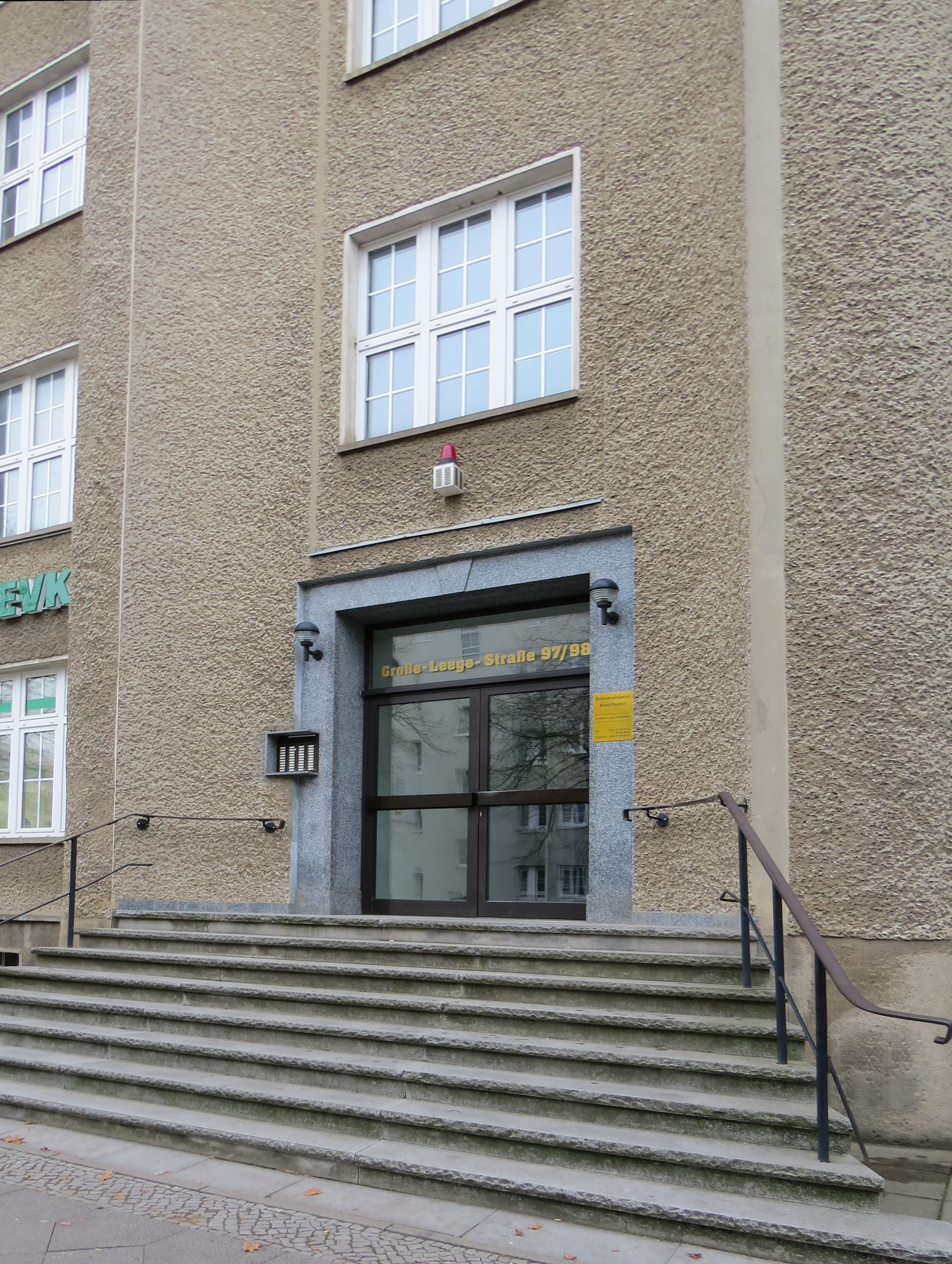 Gebäudeensemble der Kahlbaum-Sprit- und Likörfabrik